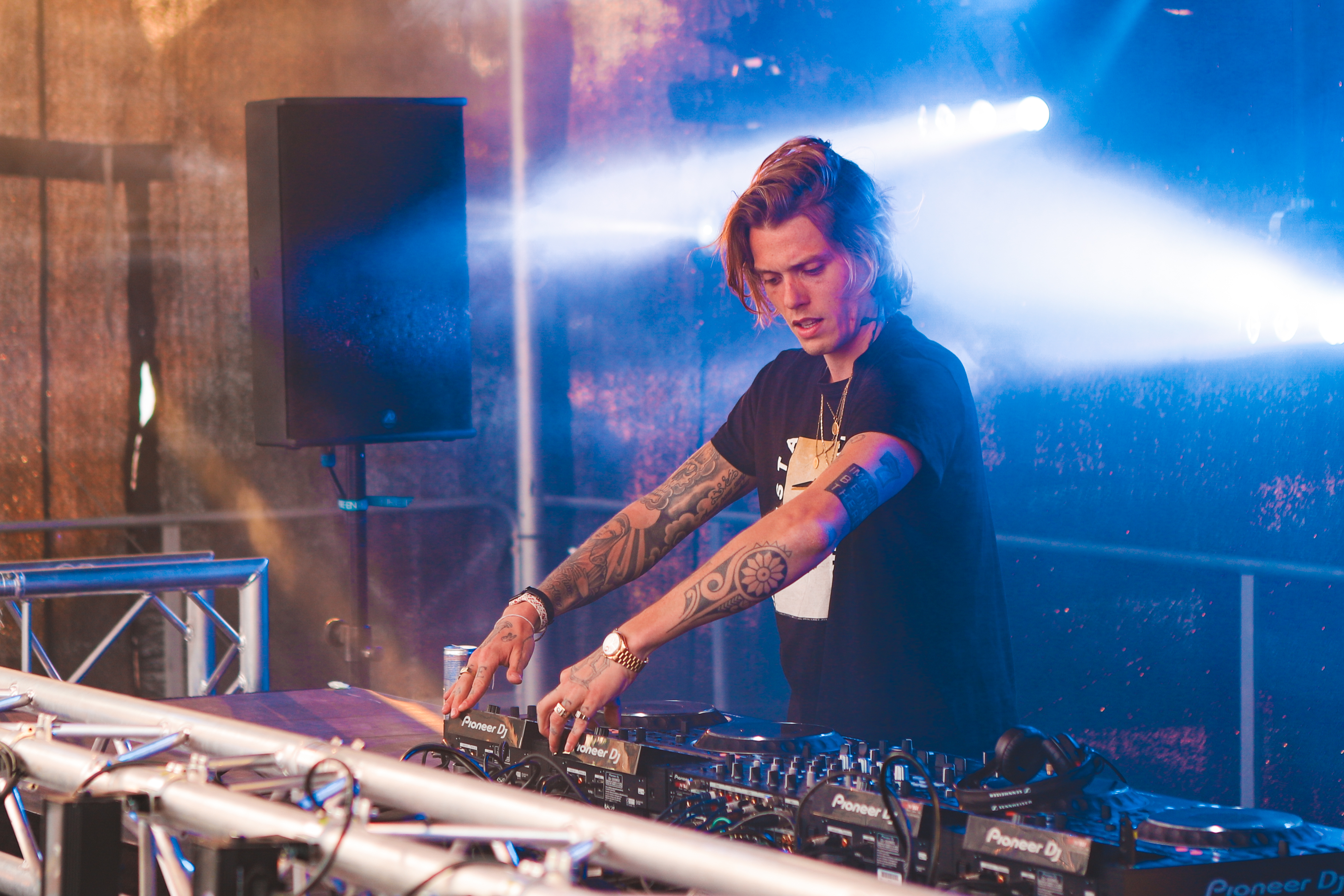 Tony Junior tijdens een optreden in Emmen (2019